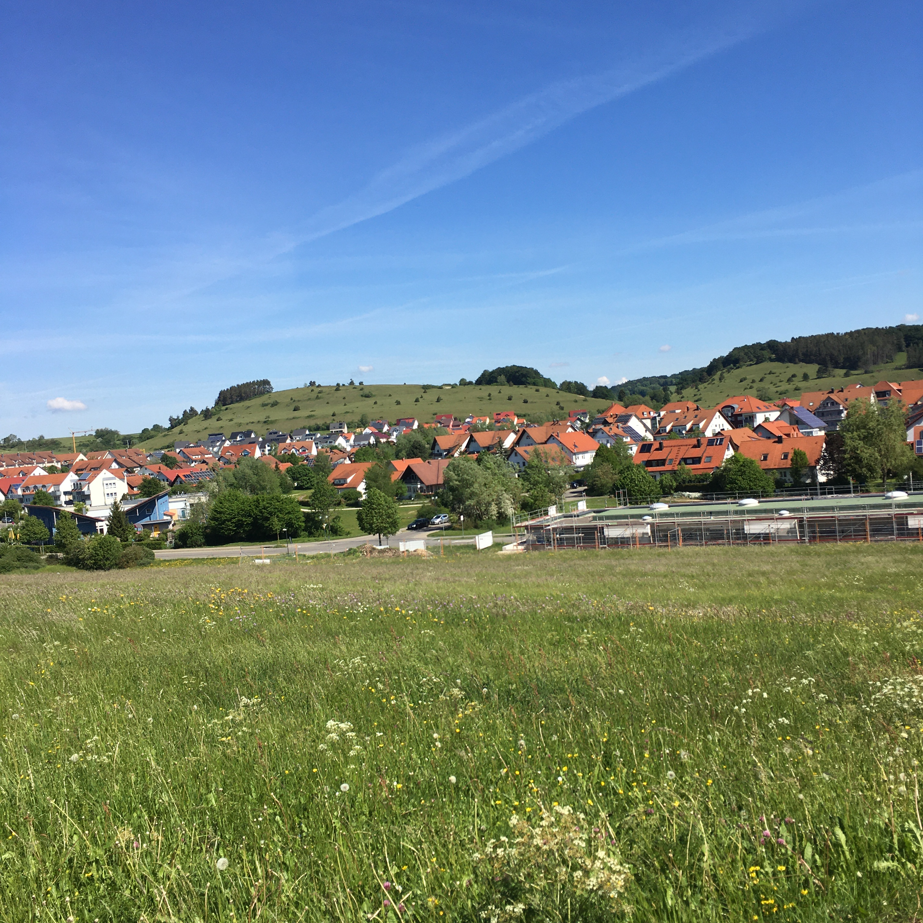 Kirchtal Münsingen